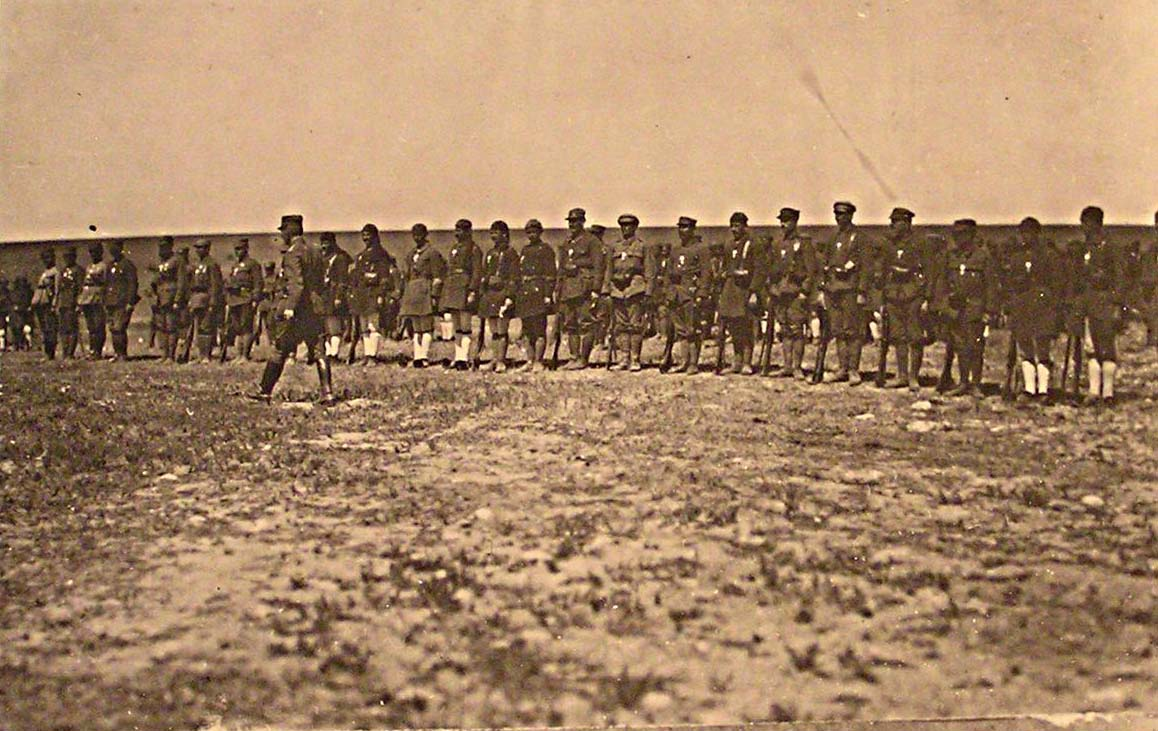 Οπλίτες του 53ο Συντάγματος Πεζικού της Ανεξαρτήτου Μεραρχίας τιμημένοι με το Αριστείο Ανδρείας κατα την ώρα επιθεώρησηςTürkçe: Batı Cephesi'nde Yunan Bağımsız Bölüğü'nün askerleri teftiş ediliyor